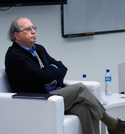 Jesús Martín-Barbero Profesor e investigador Jorge Bonilla Vélez Jefe del pregrado en Comunicación Social de la Universidad EAFIT